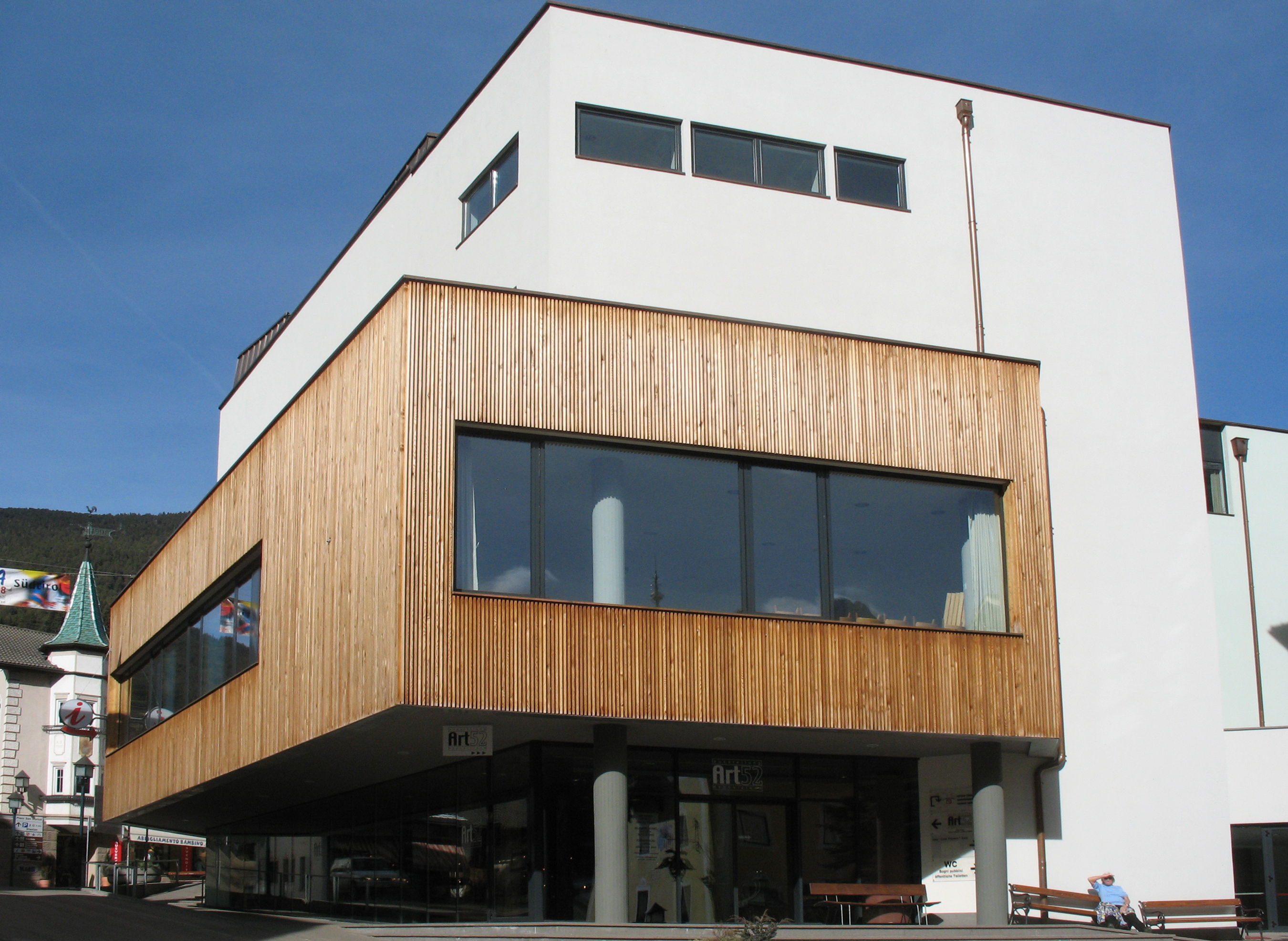 Building in St. Ulrich in Gröden - Ortisei Val Gardena by Austrian architect Hubert Prachensky